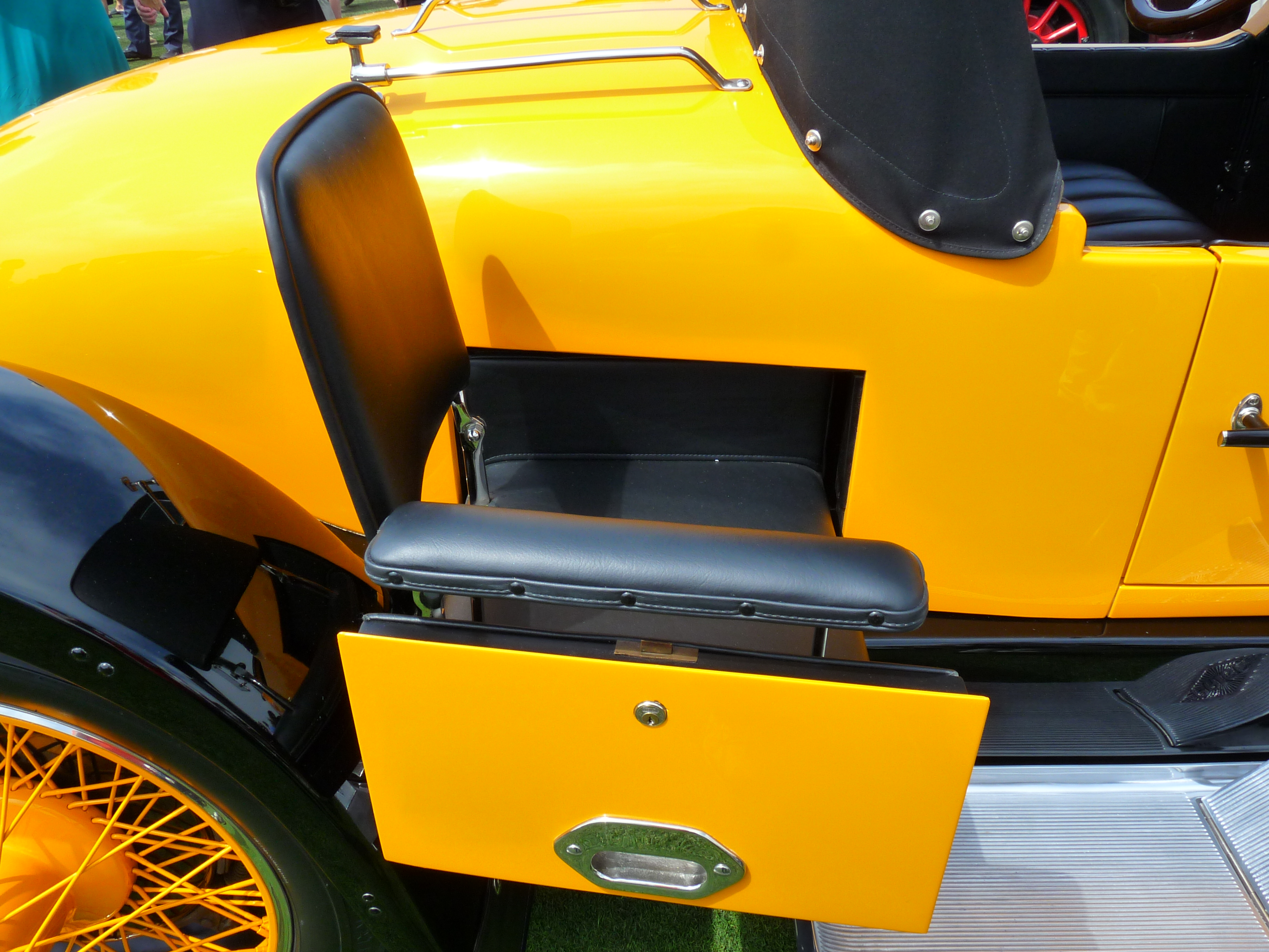 1921 Paige Model 6-66 Daytona Speedster